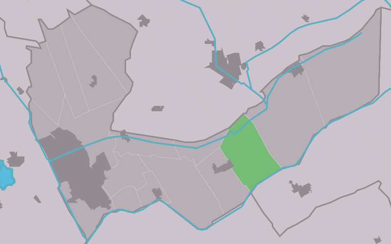 Kaartsje fan himrik fan Aldehoarne